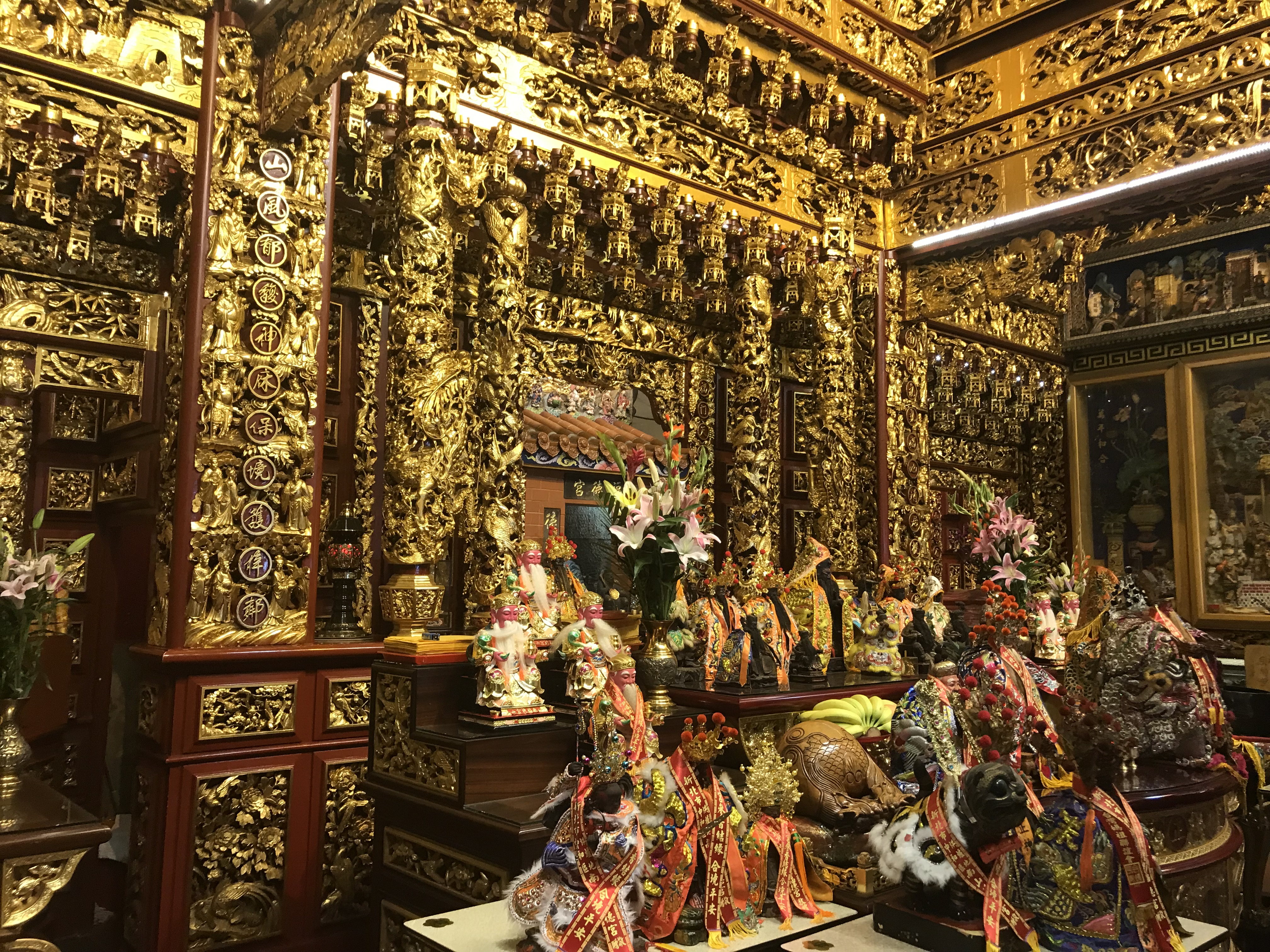 中文（台灣）: 烘爐地南山福德宮正殿內小廟